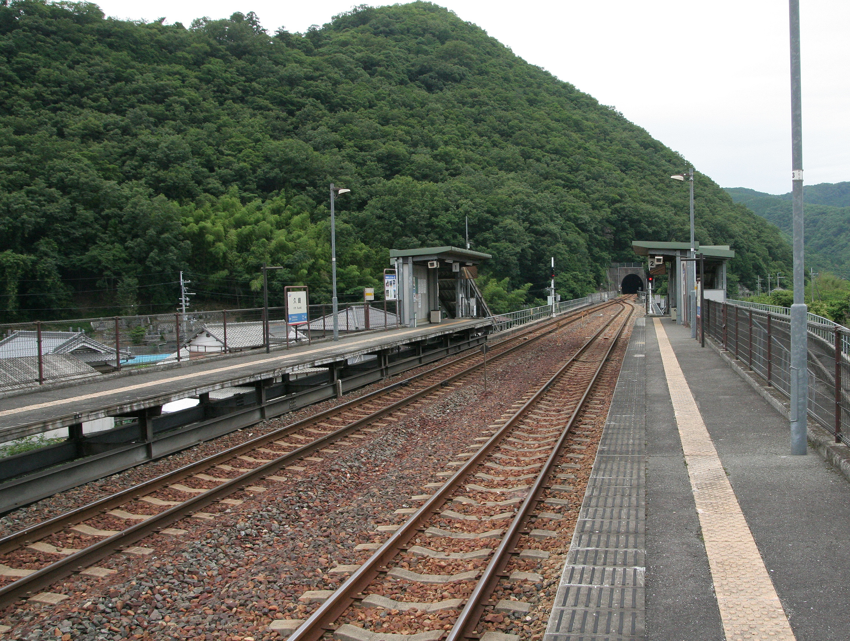 智頭急行 久崎駅の構内